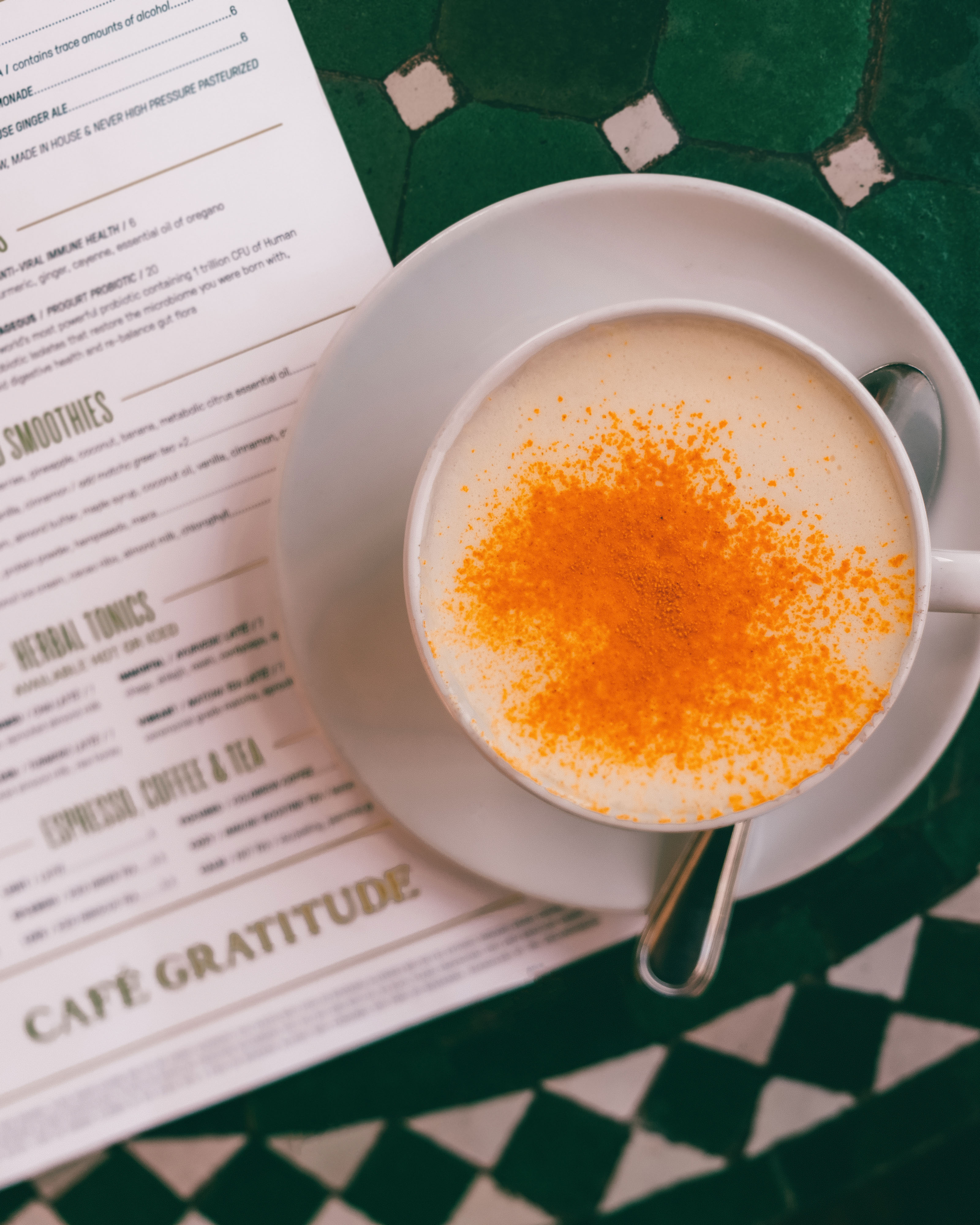 Turmeric latte at Cafe Gratitude in Los Angeles. Very unique flavor.